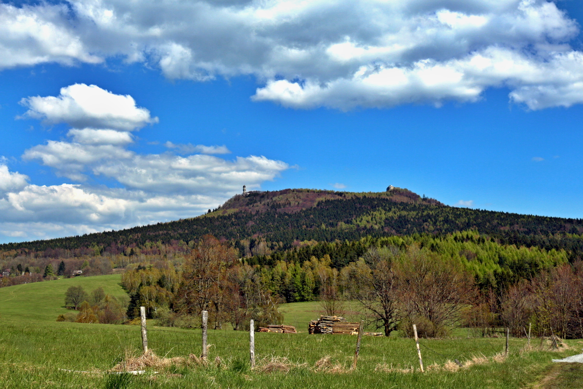 Hvozd od Krompachu